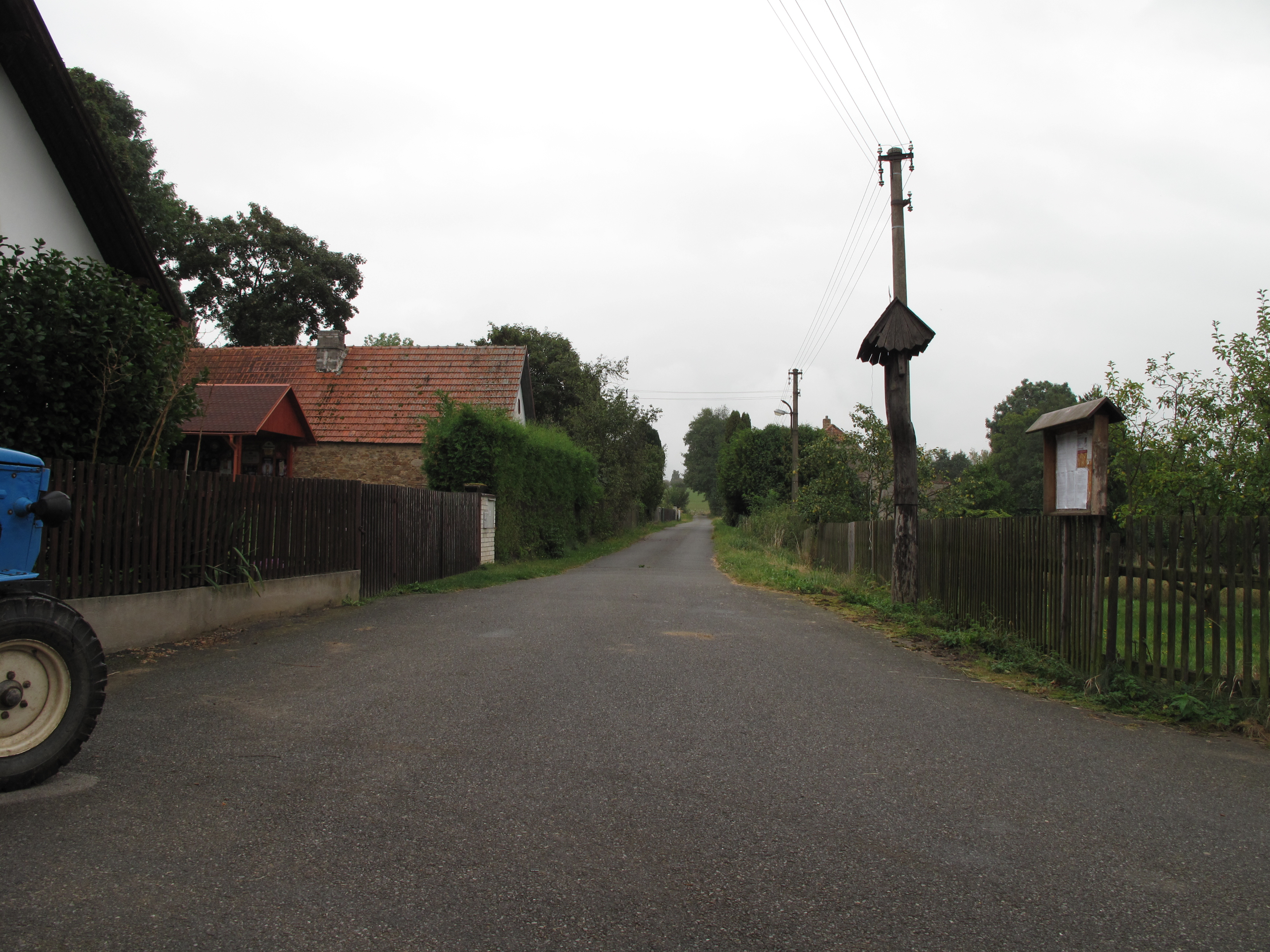 Výjezd z vesnice. Okres Pelhřimov, Česká republika.